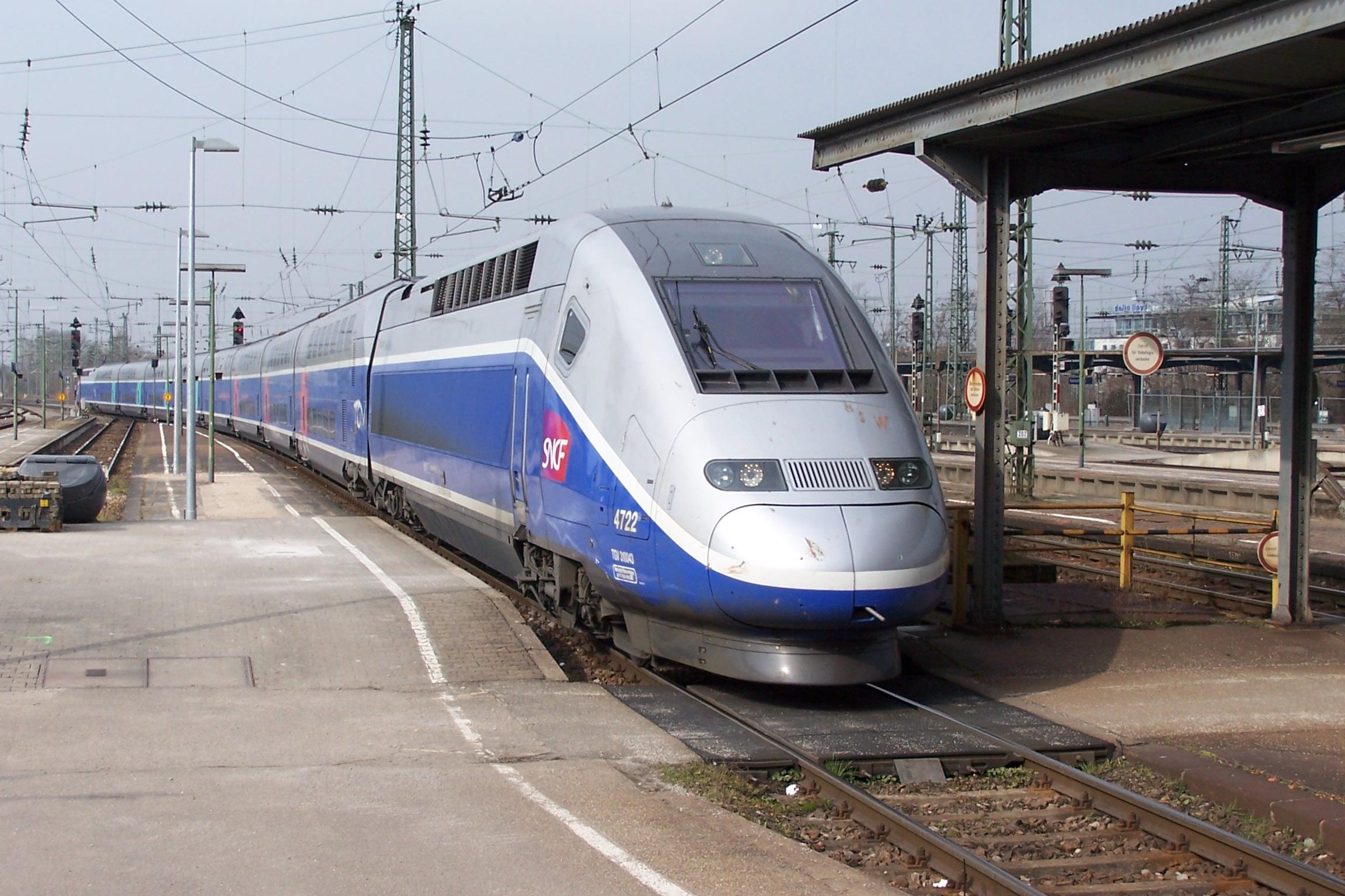 TGV 4722 in Karlsruhe Hbf bei der Einfahrt